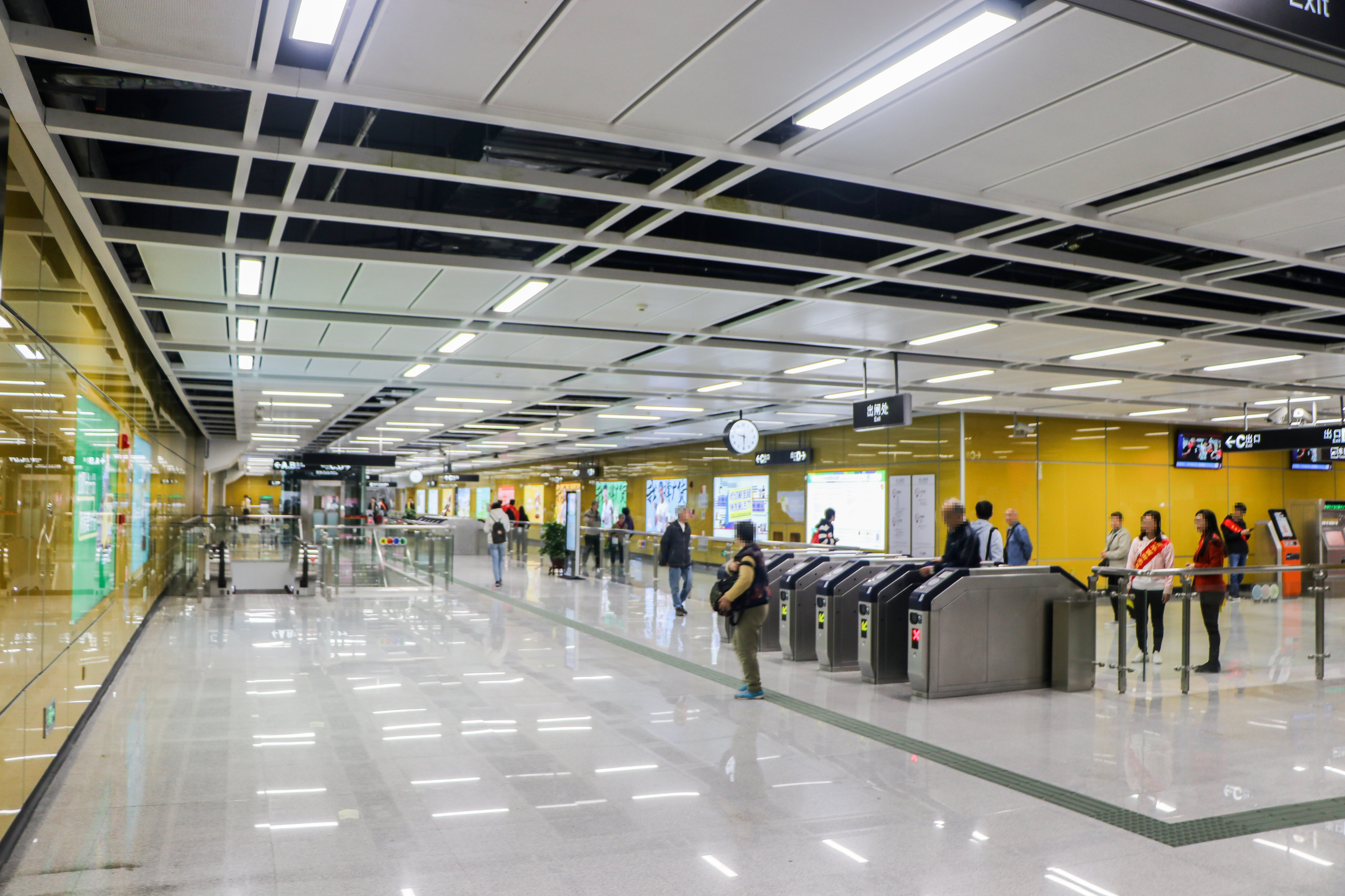 广州地铁同福西站